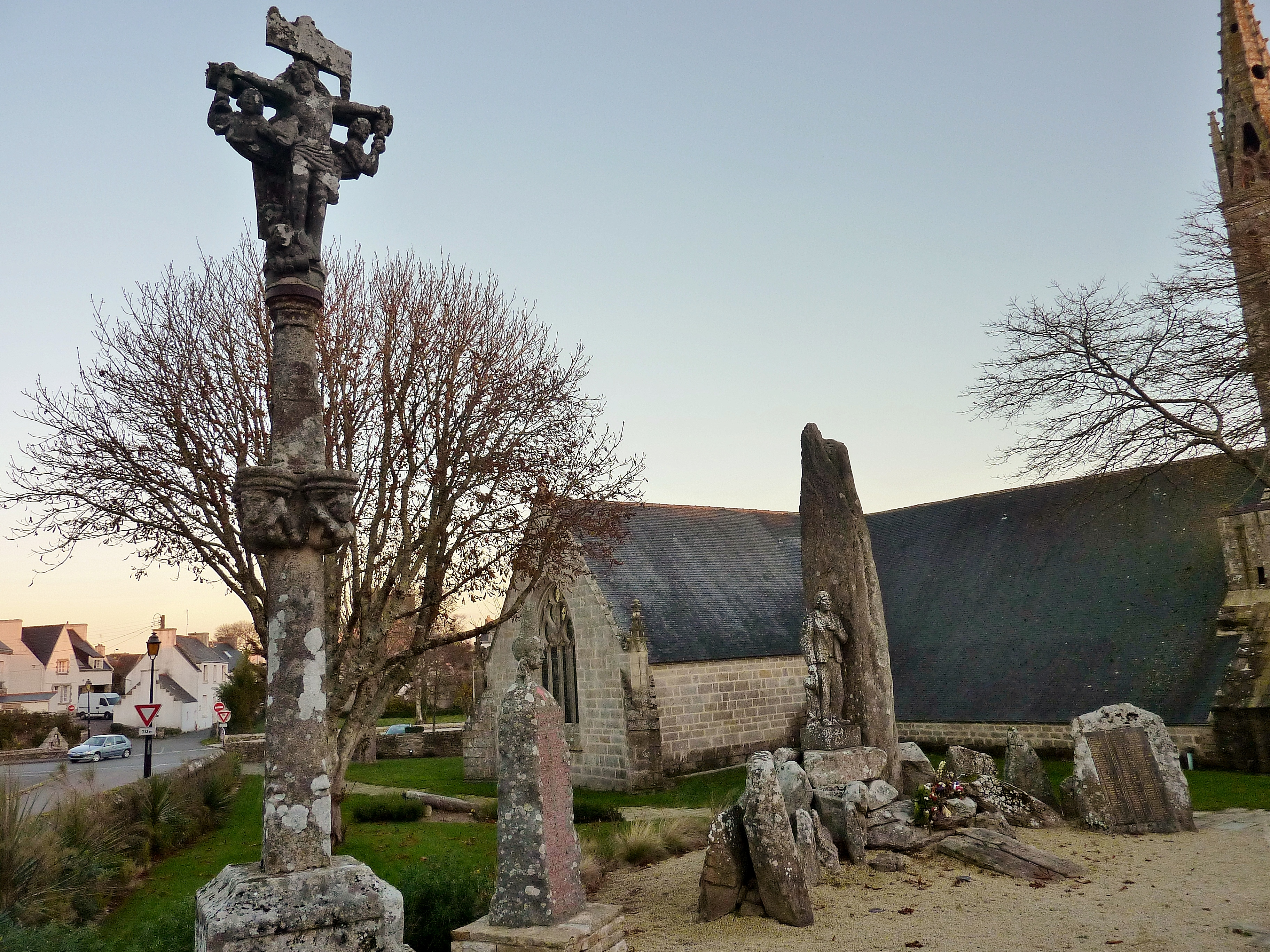 Plozévet : le calvaire du bourg et le monument aux morts